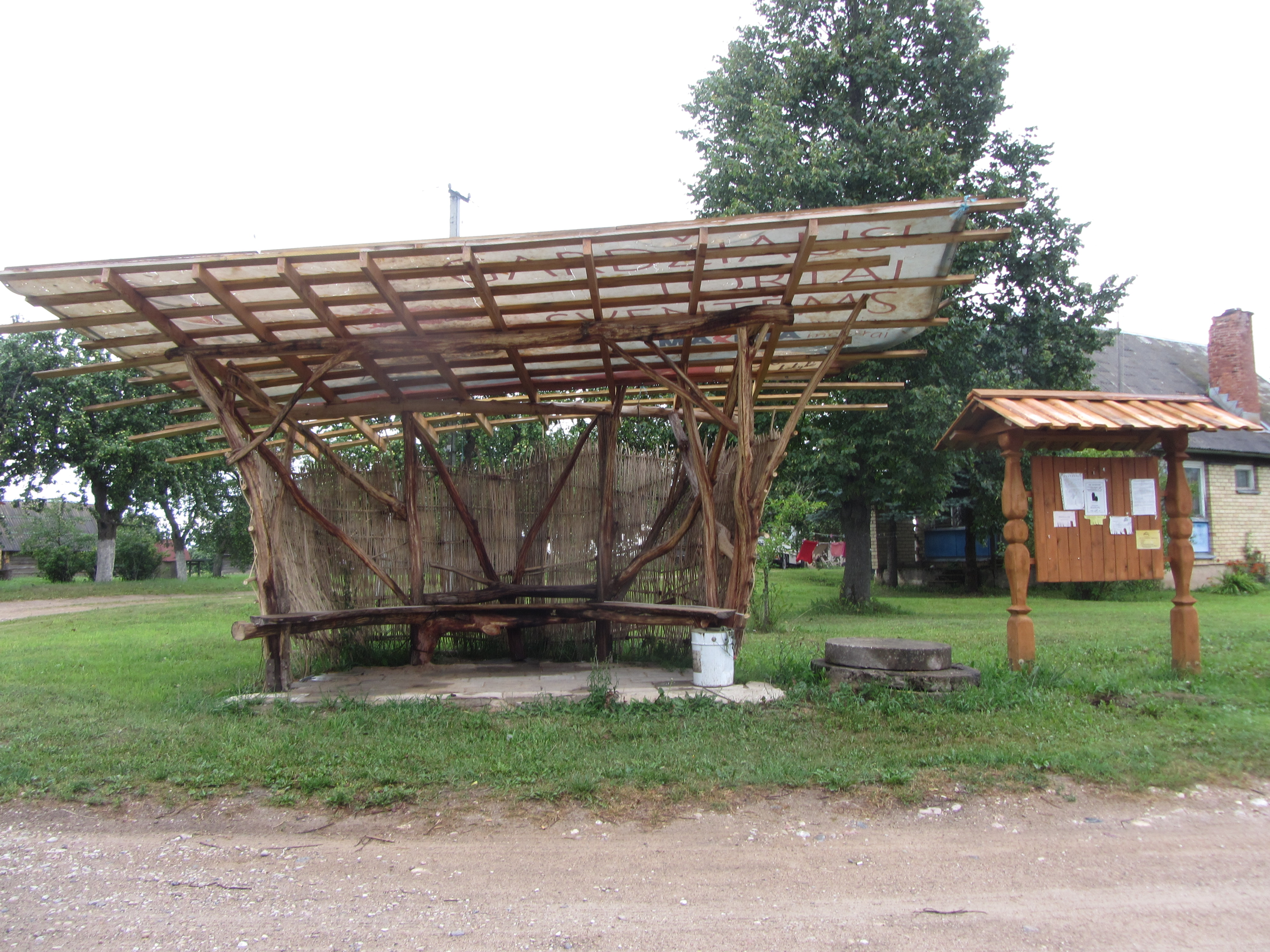 Duliai 32230, Lithuania